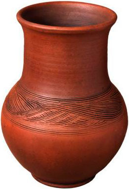 Малая глиняная крынка для молока с простым узором из переплетеной вязи. ООО «Гончар».